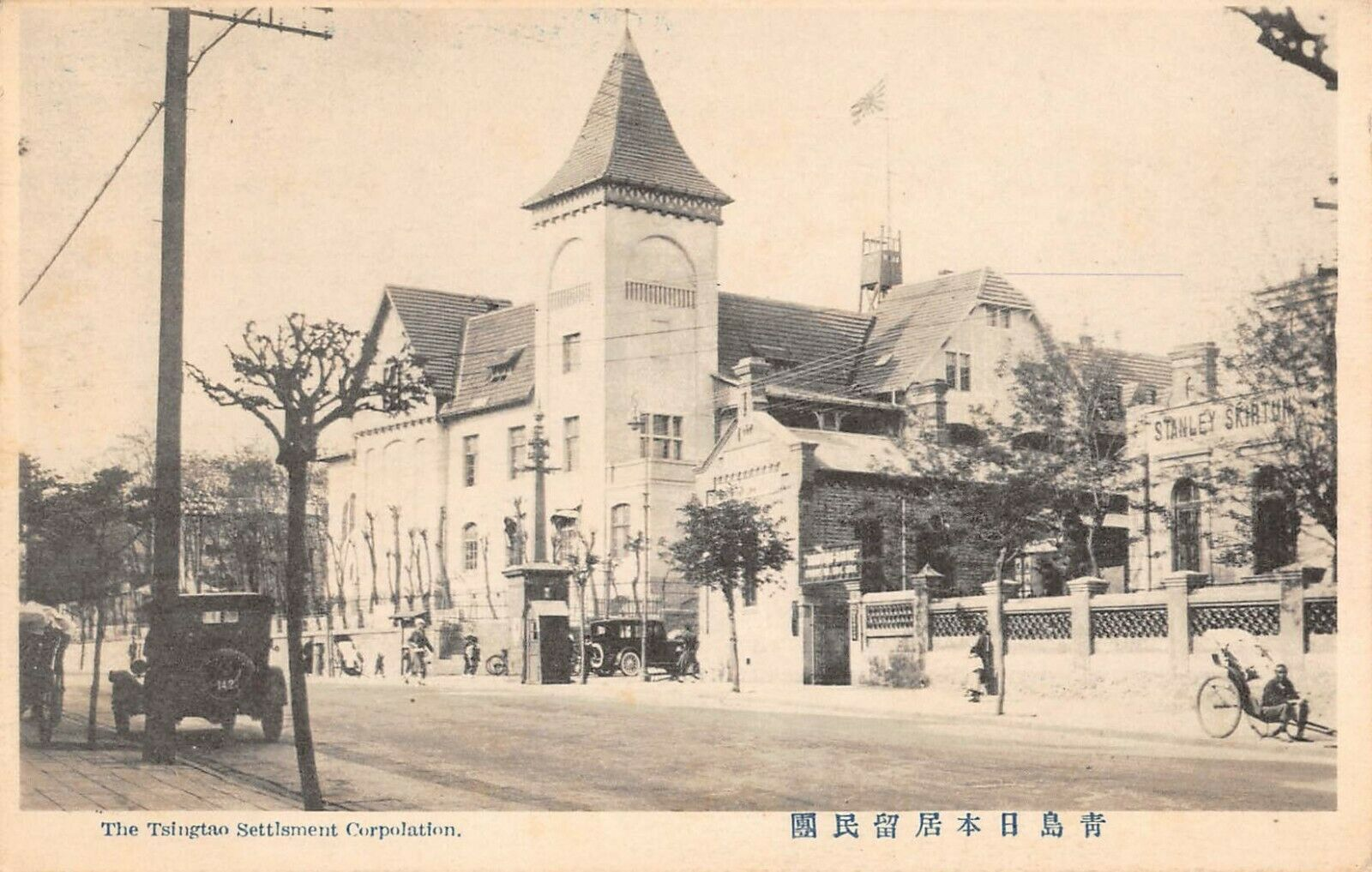 青岛日本居留民团，原德国水兵俱乐部